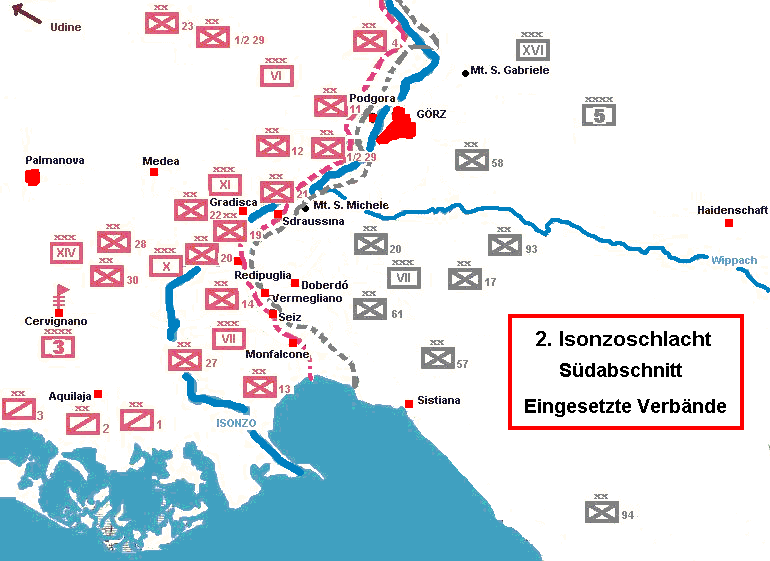 Eingesetzte Truppenverbände im Südabschnitt der Isonzofront (2. Schlacht am Isonzo)